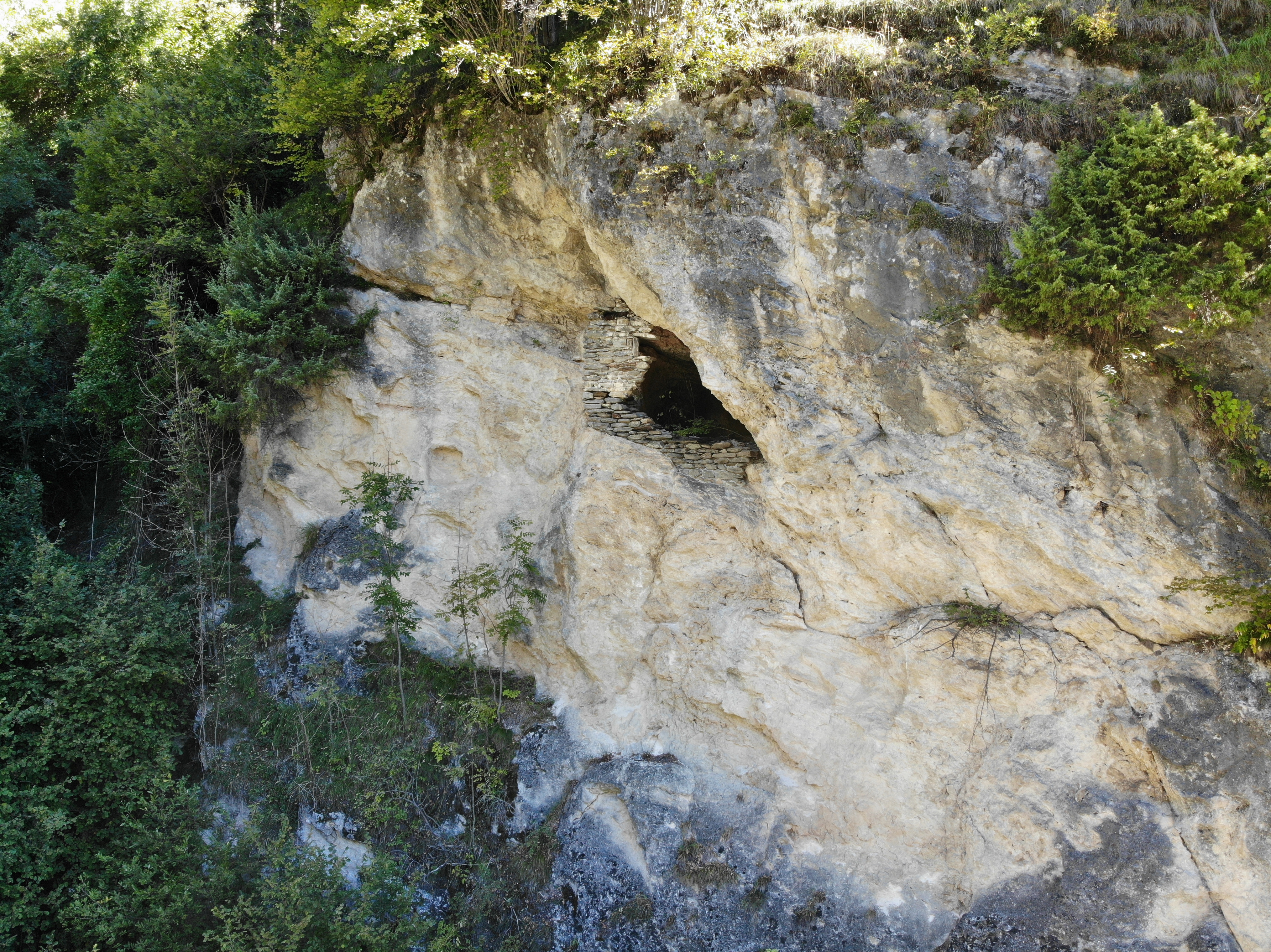 Case dei Pagani Ansicht von Westen